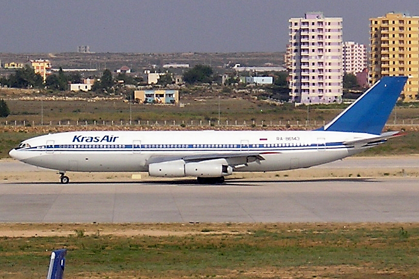 Kras Air Iljuschin Il-86 RA-86143